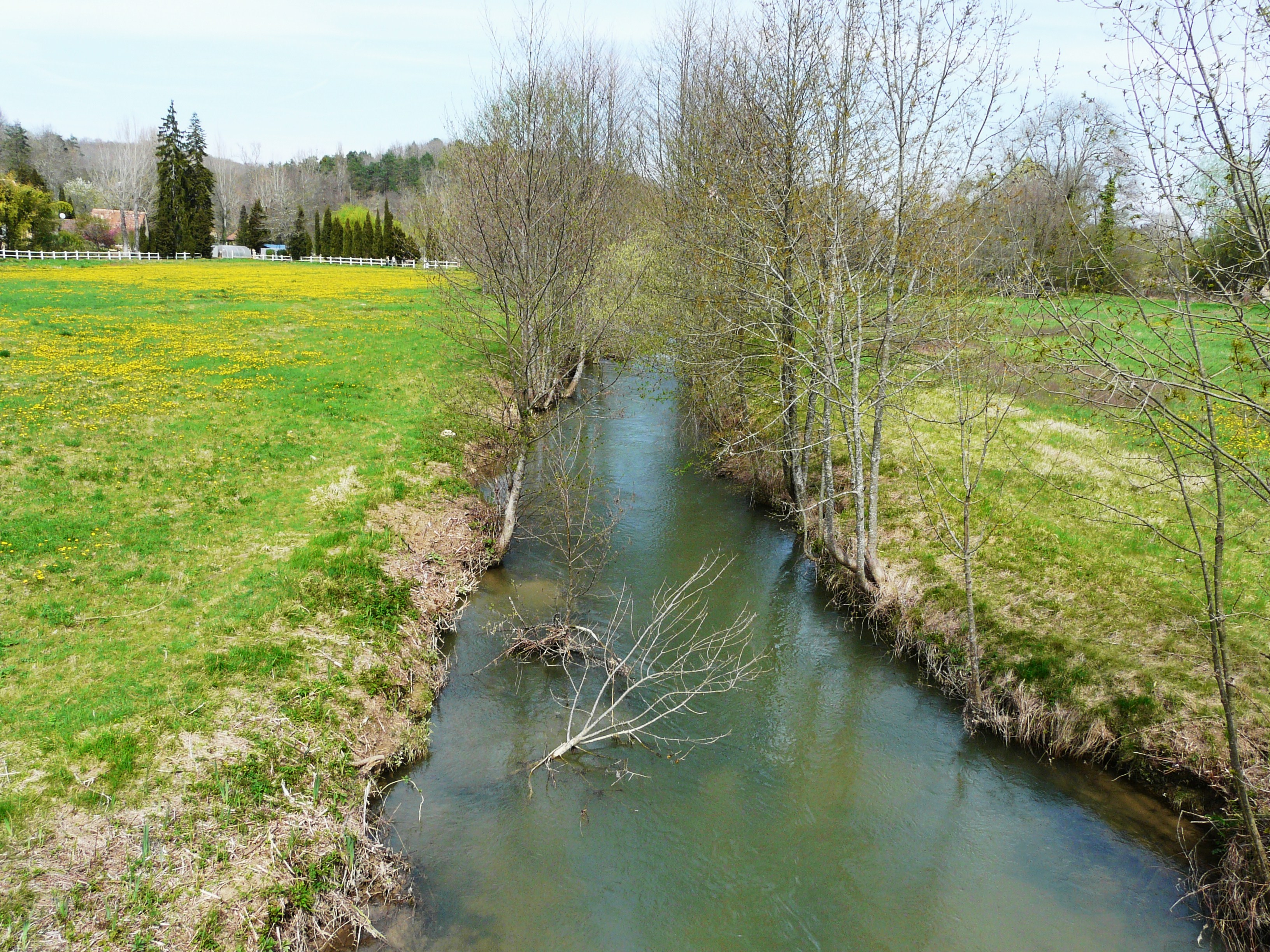 Le Caudeau en amont du pont de la route départementale 21E1, près du lieu-dit Landrevie-Basse, entre Lamonzie-Montastruc (à gauche) et Saint-Sauveur, Dordogne, France.